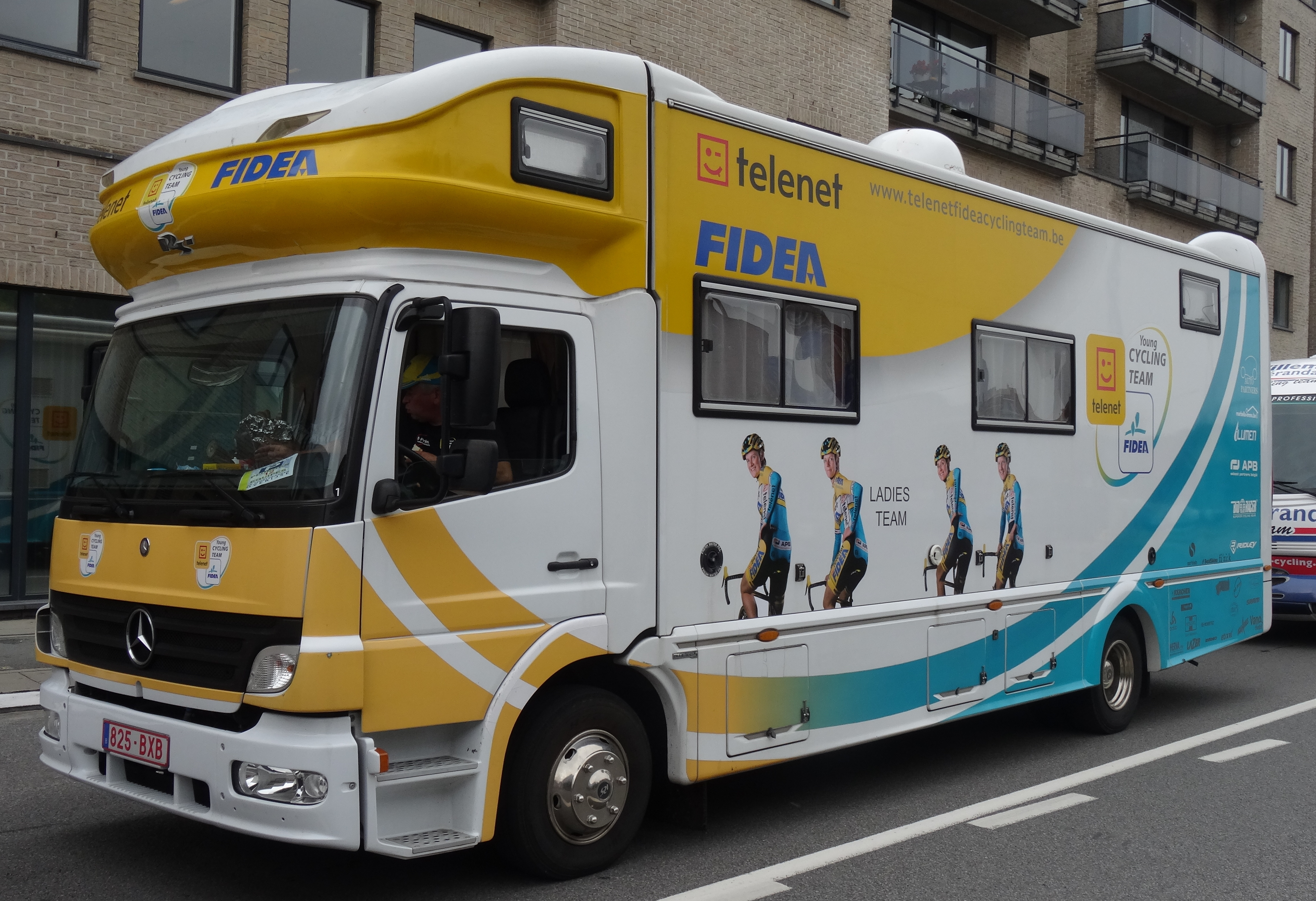 Reportage photographique réalisé le mercredi 27 août à l'occasion de l'arrivée de la Druivenkoers Overijse 2014 à Overijse, Belgique.